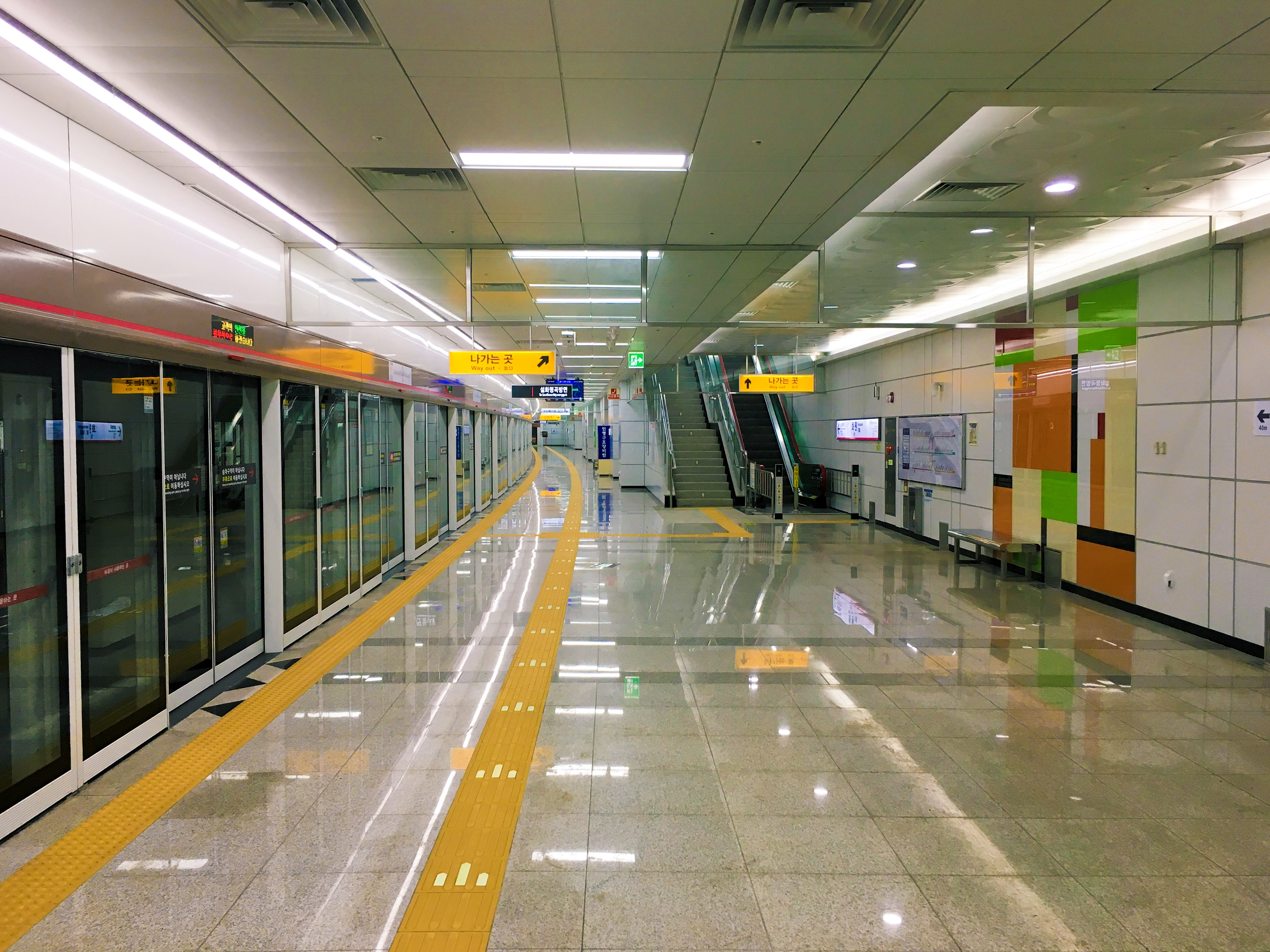 화원역 승강장